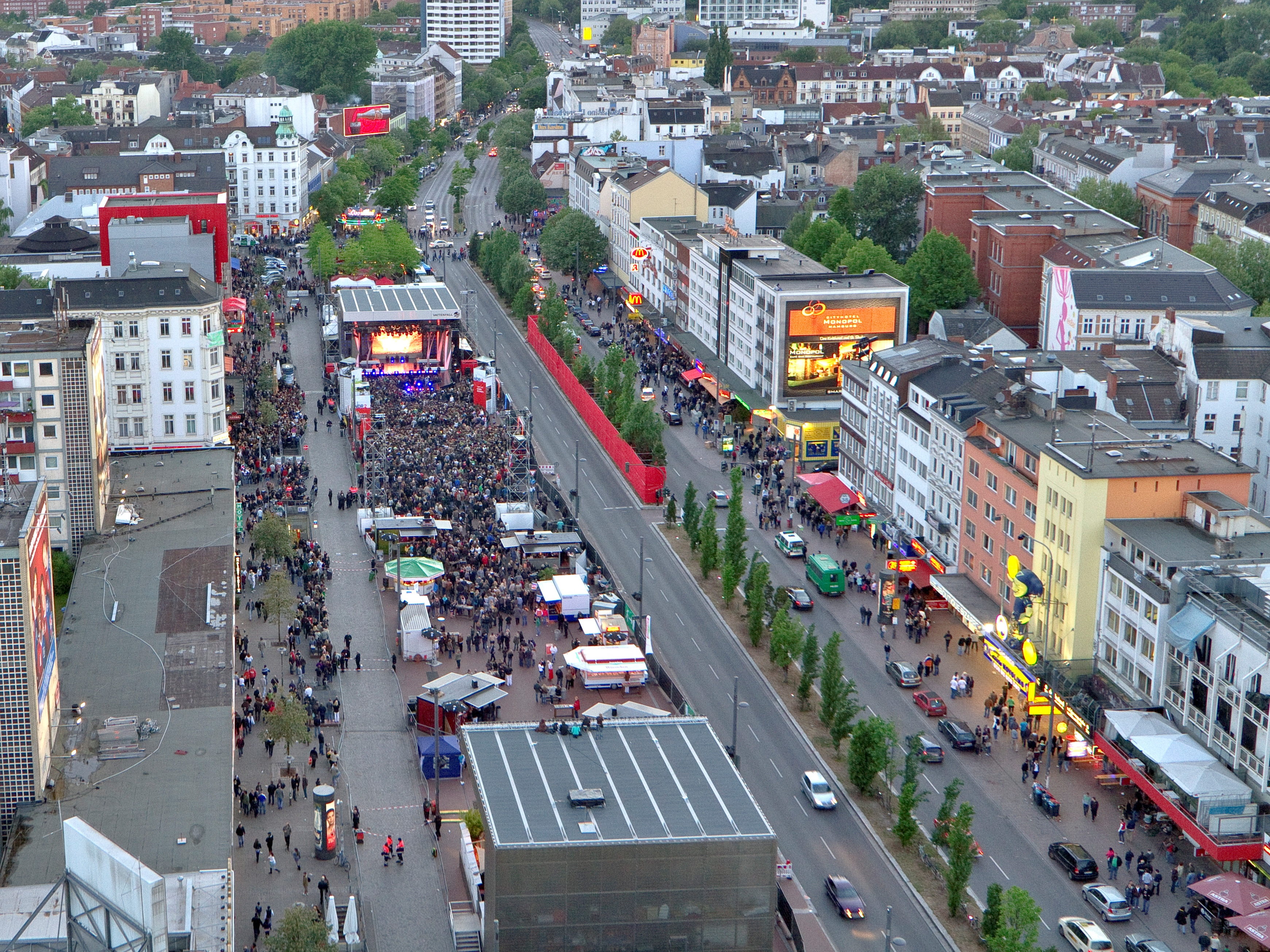 Spielbudenplatz Hamburg St. Pauli